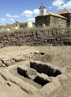 Imagen de la necrópolis de origen visigodo localizada en los restos de la ciudad romana de Sisapo.